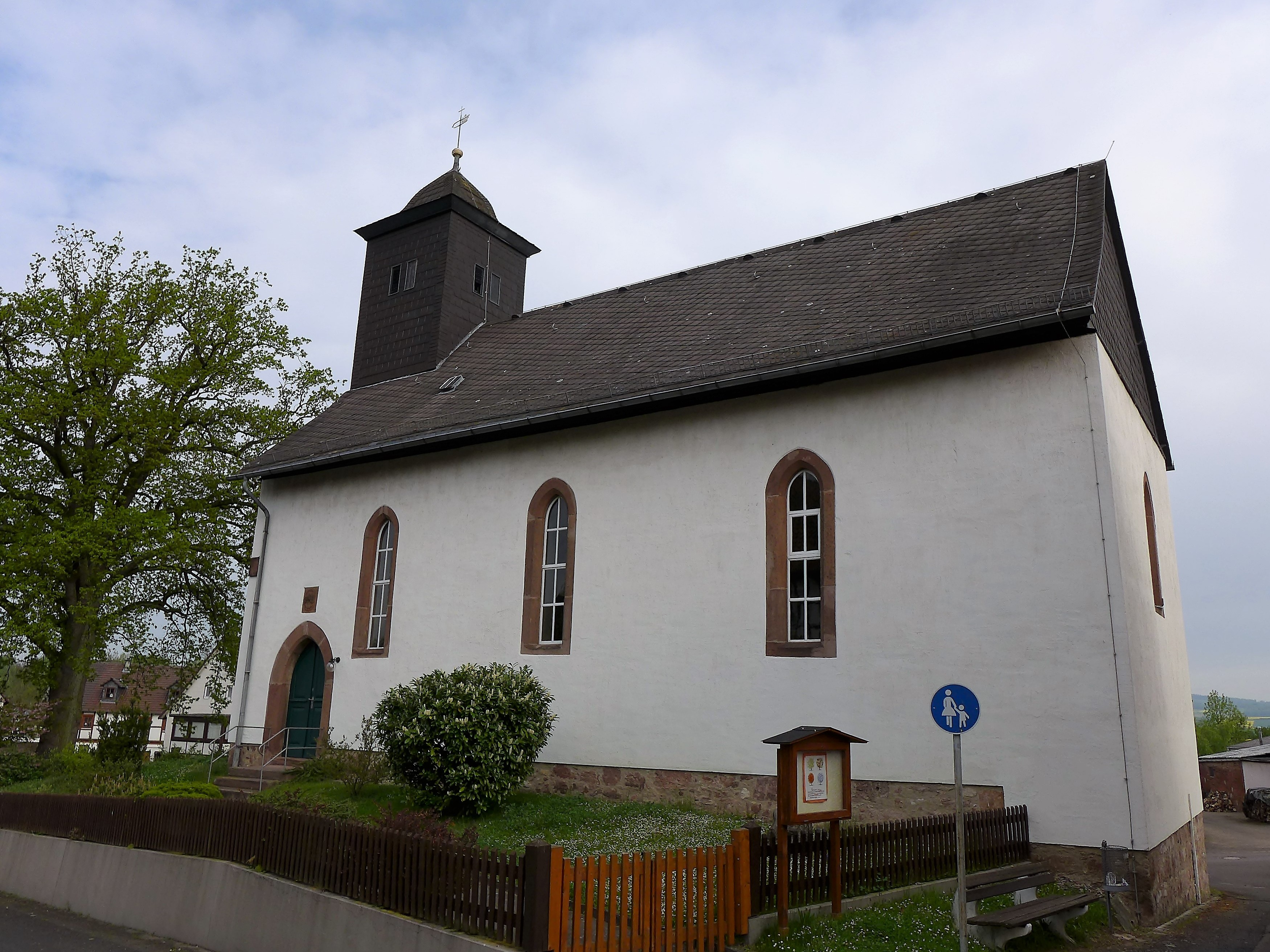 Eingangsseite der Kirche